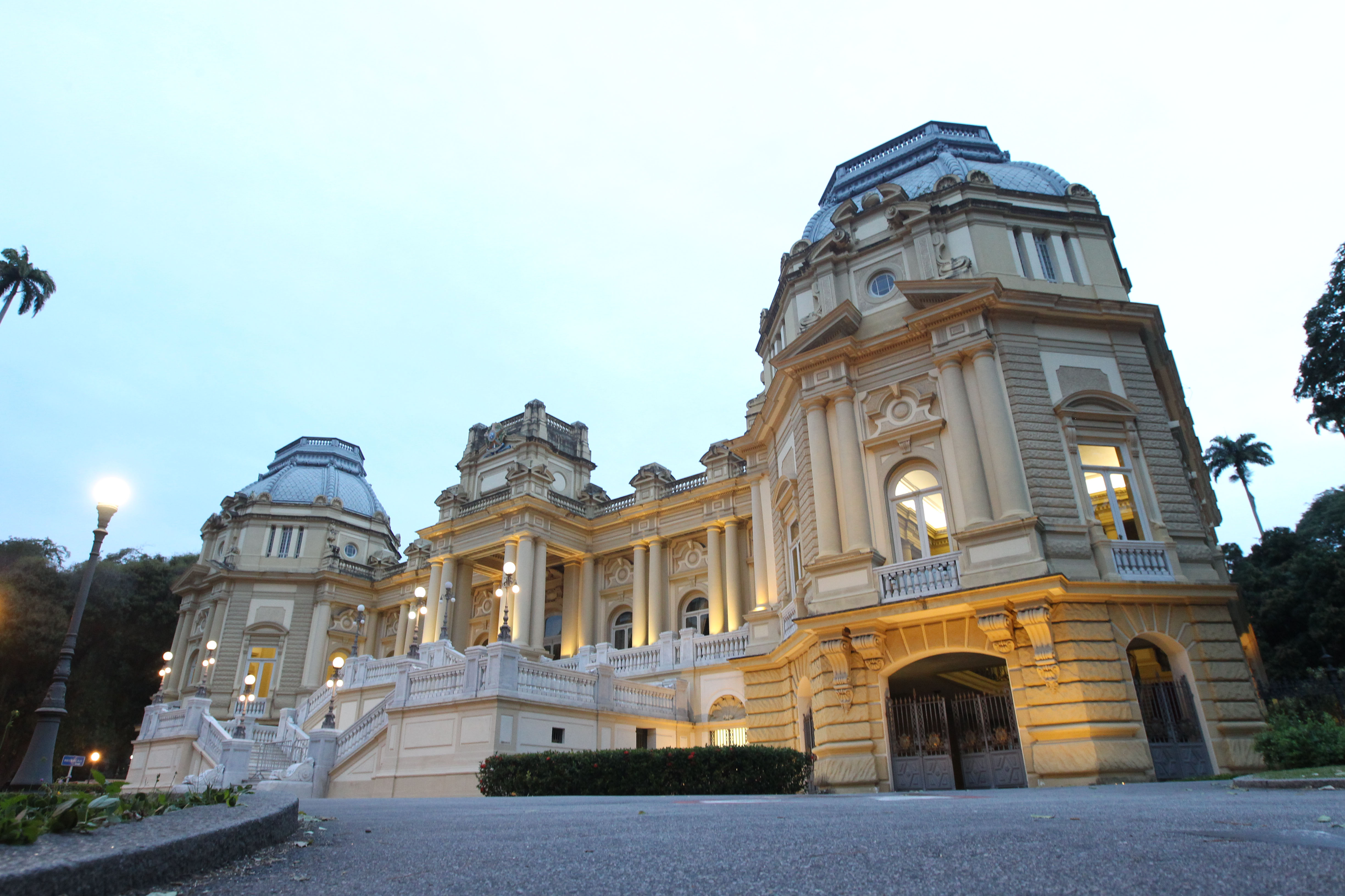 Palácio Guanabara em agosto de 2017.